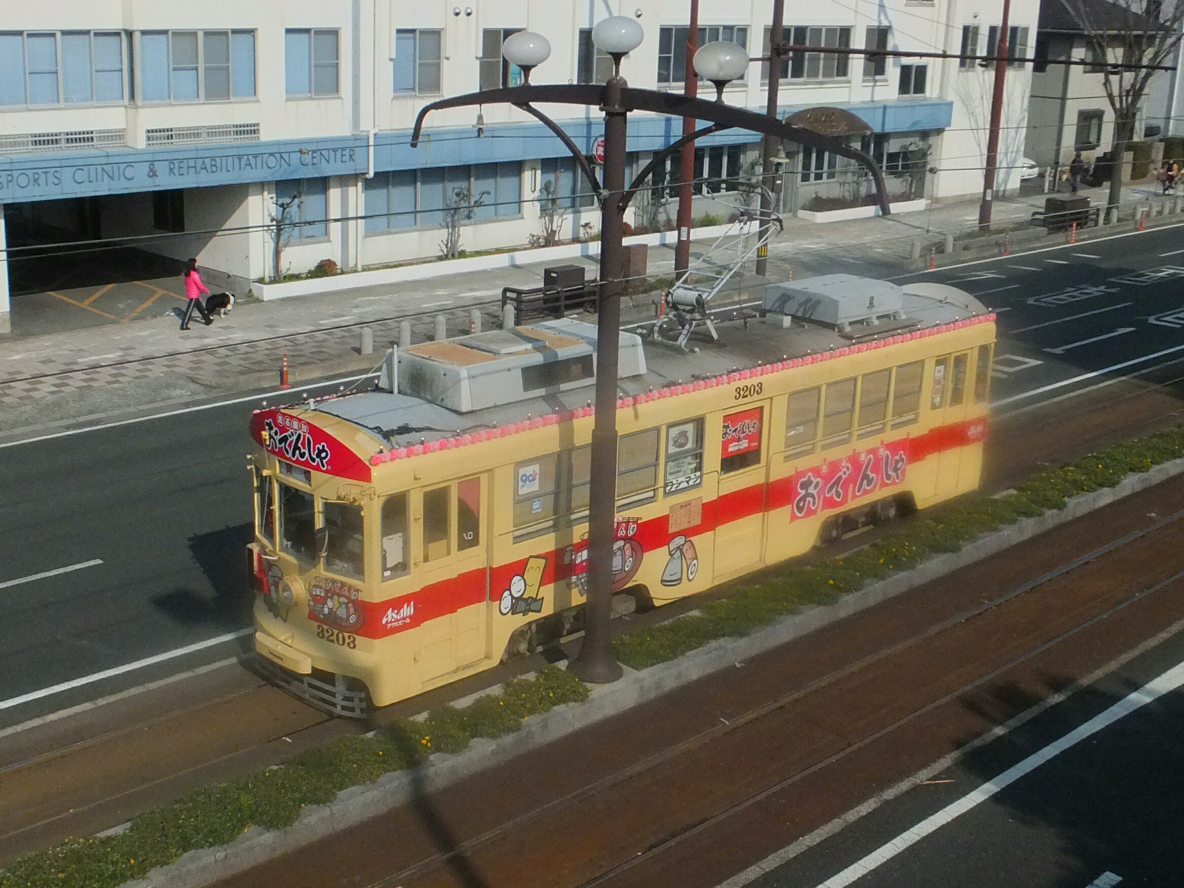 豊橋鉄道東田本線を運行する路面電車「おでんしゃ」。愛知県豊橋市八町通5丁目にて